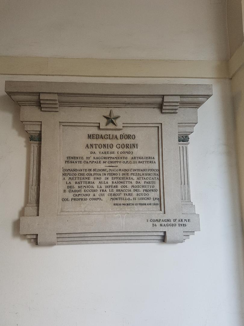 Targa commemorativa nell'androne del comune di Varese a Antonio Gorini